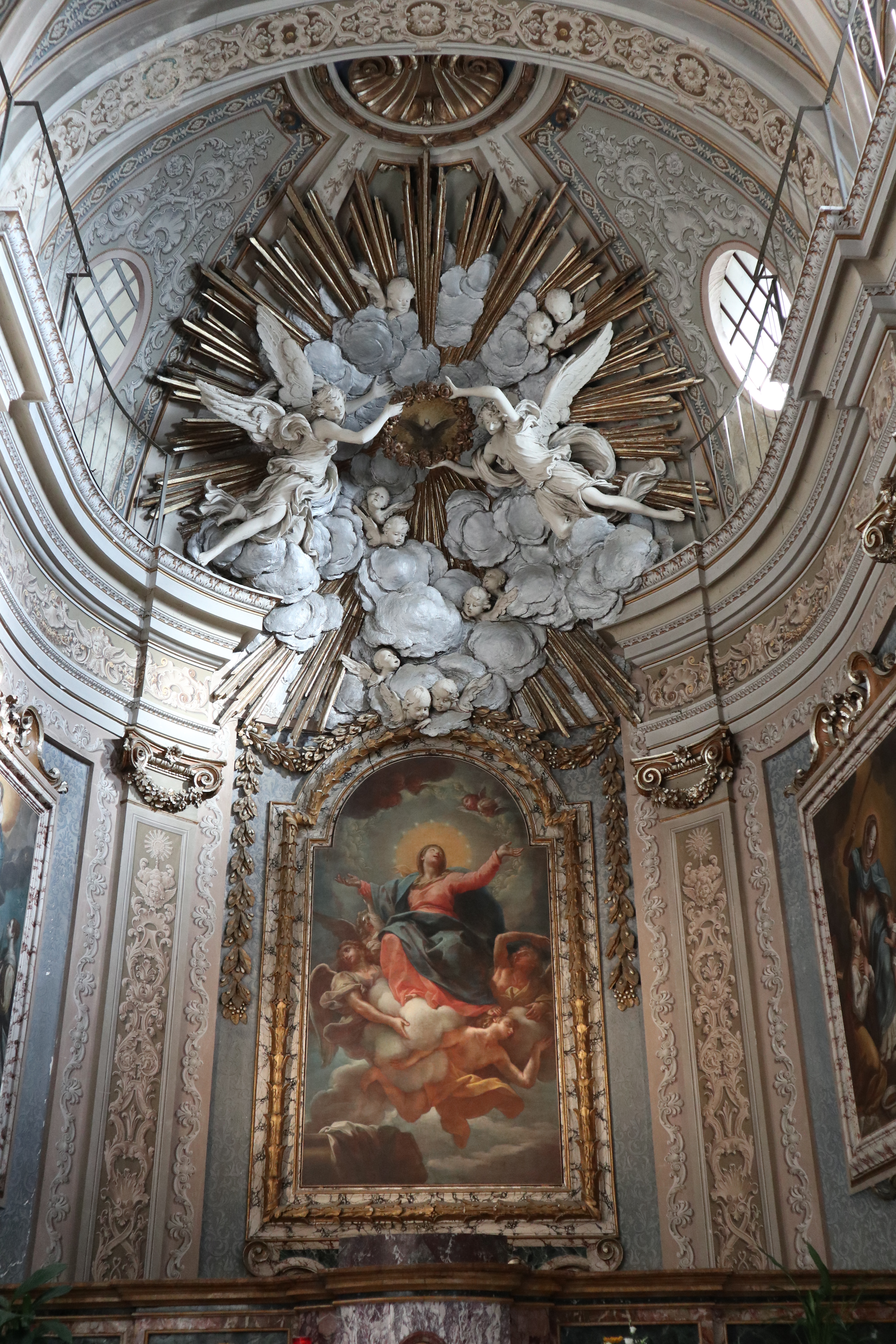 "Assunzione della Vergine Maria", Etienne Parrocel